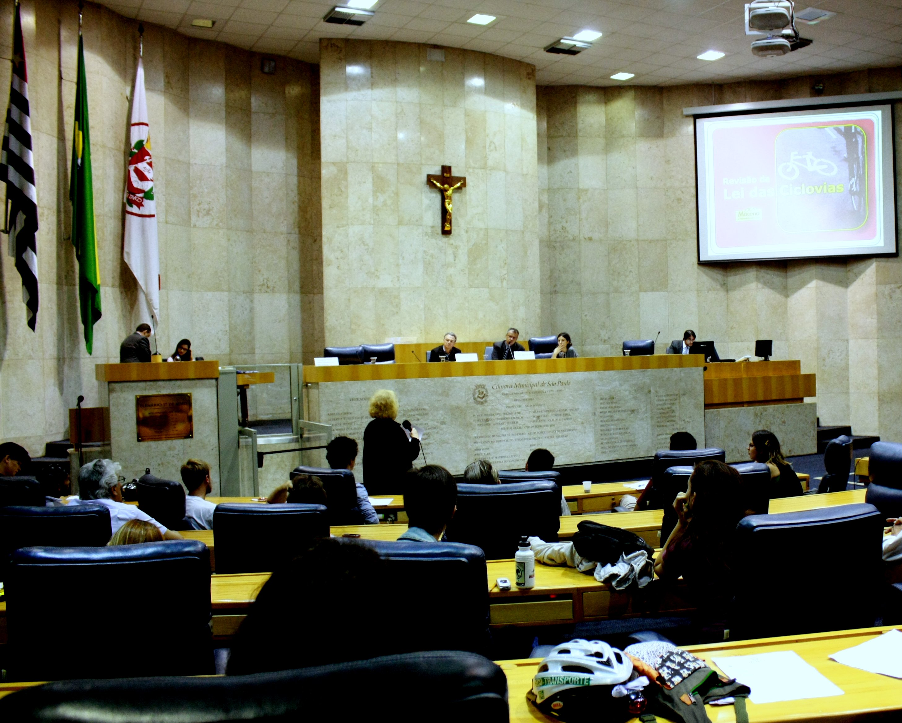 Audiência pública sobre a revisão da lei das ciclovias 14 266, que reuniu ciclistas, cicloativistas, ongs e outras entidades para debater, com o vereador Chico Macena, o projeto de lei que amplia benefícios a ciclistas, na Câmara Municipal de São Paulo. Presente, na mesa, Soninha Francine ouvindo a cicloativista Laura Ceneviva.